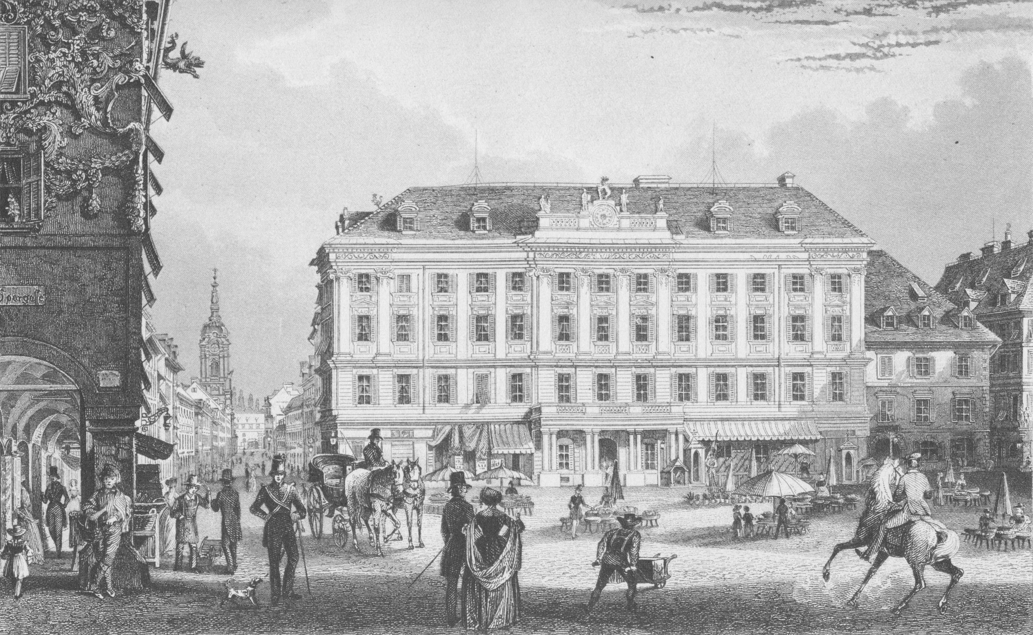 Das Rathhaus.